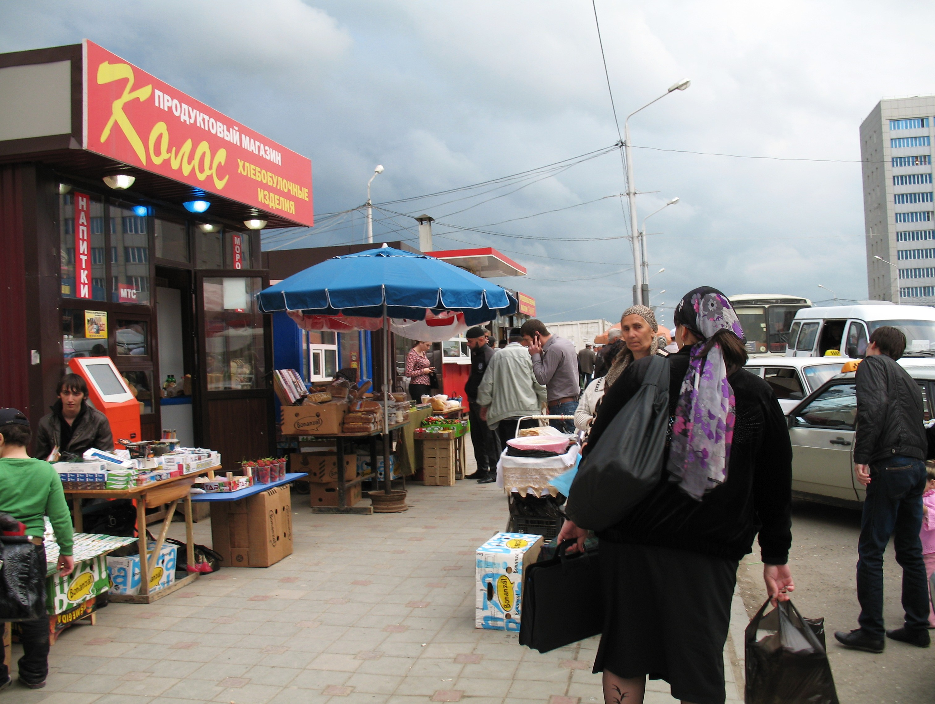 Obnovené tržiště na ulici Míru v Grozném (květen 2011)